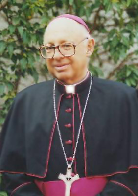 Mons. Javier Prado Aránguiz, Obispo Emérito de Rancagua.